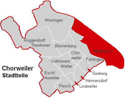 Lagekarte Merkenich im Stadtbezirk Köln-Chorweiler